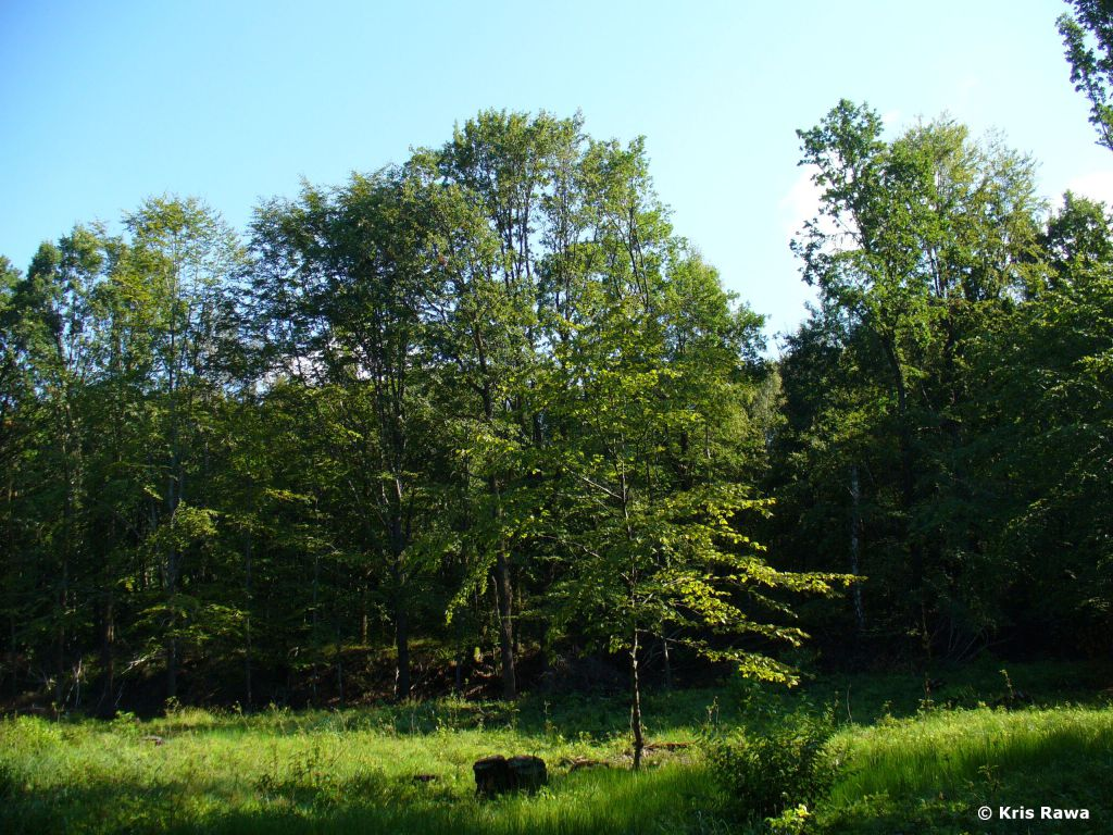 Uroczysko Buczyna